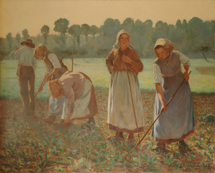 Peinture à l'huile de Jean de FRANCQUEVILLE